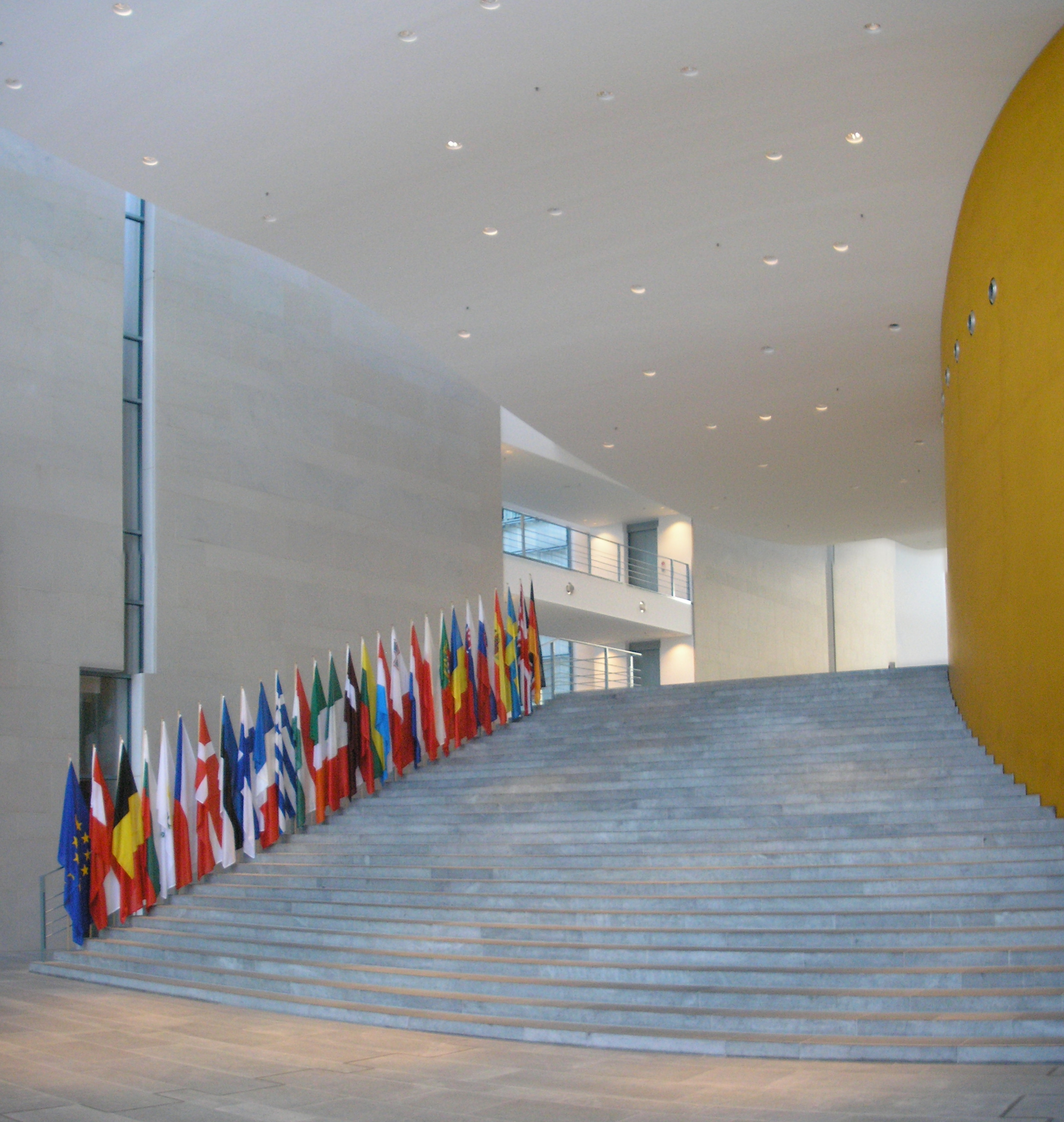 Interior view of the Bundeskanzleramt in Berlin.